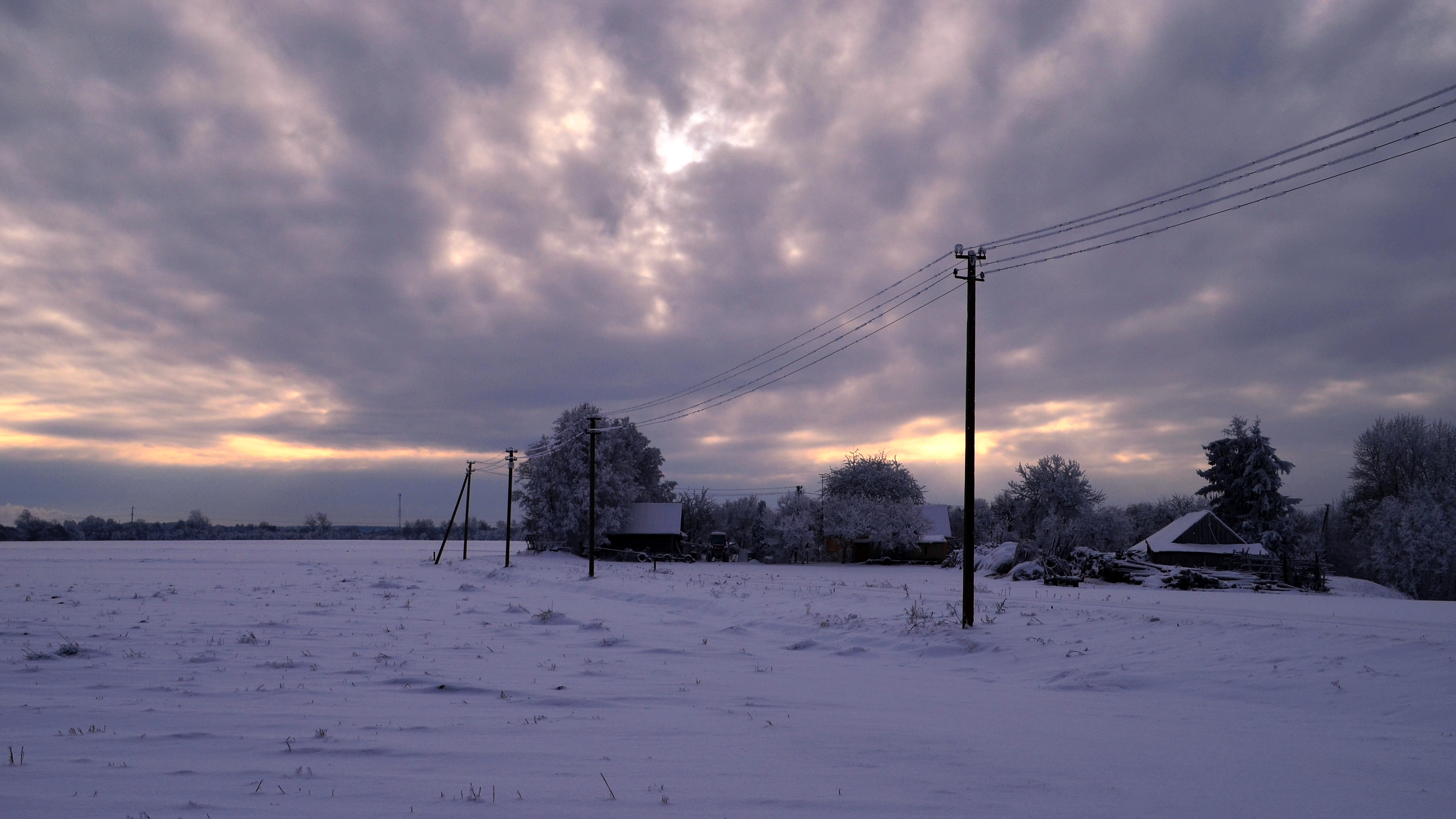 Mociūnai, Kėdainių rajonas